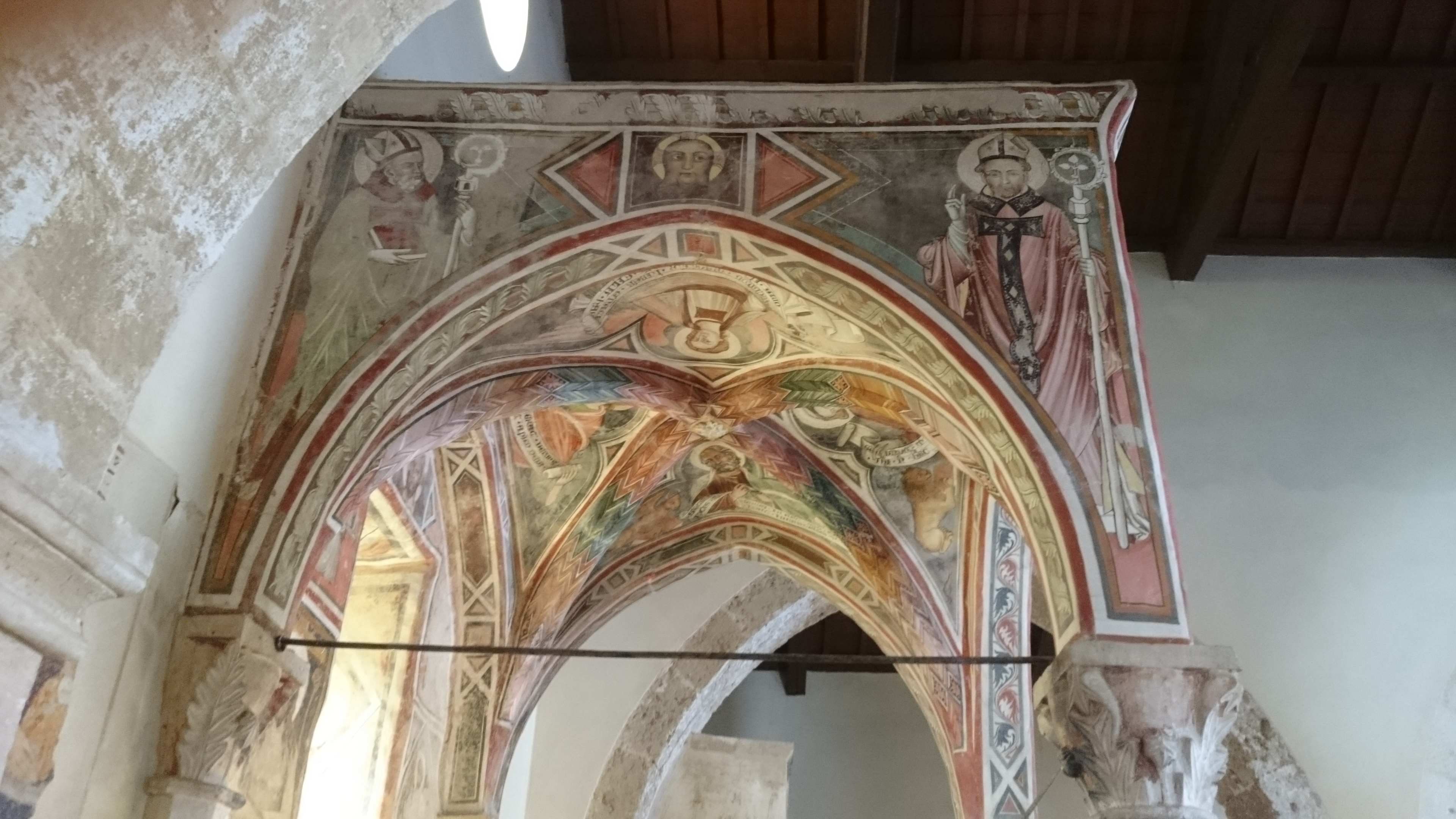 Vittorito (AQ): San Michele Arcangelo